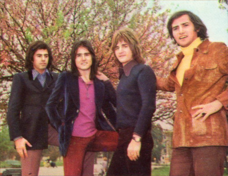 Italian musical group Alunni del Sole